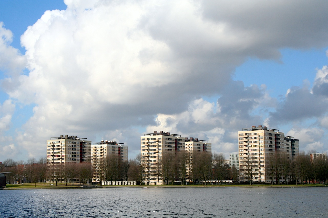 Sloterplas met Torenwijck in Osdorp. Foto: Erik Swierstra.